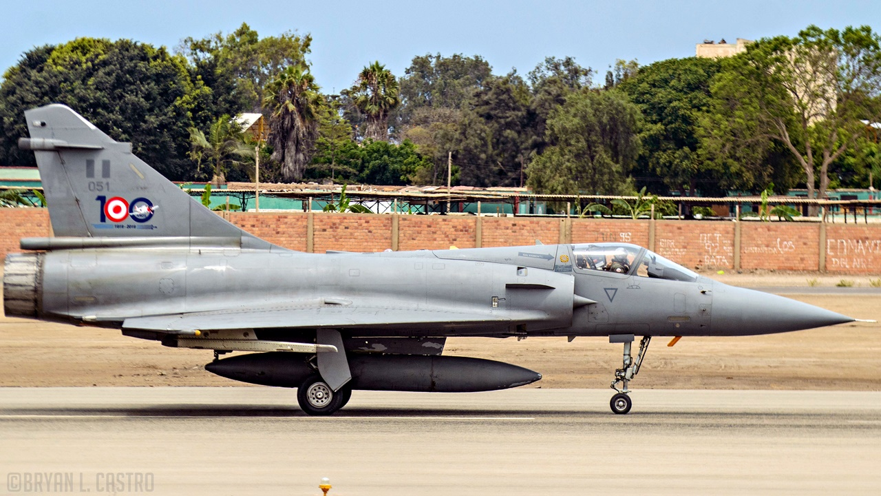 Dassault Mirage 2000P sobrevolando Lima. Fuerza Aérea del Perú.